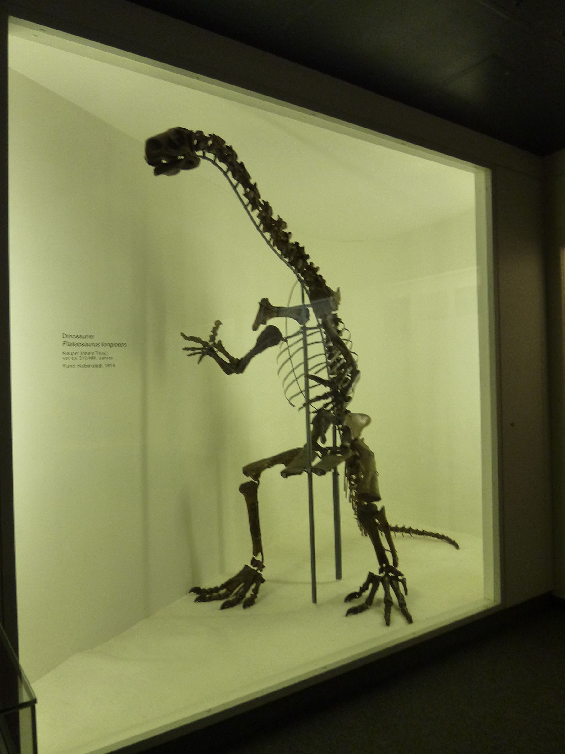 Halberstädter Saurier